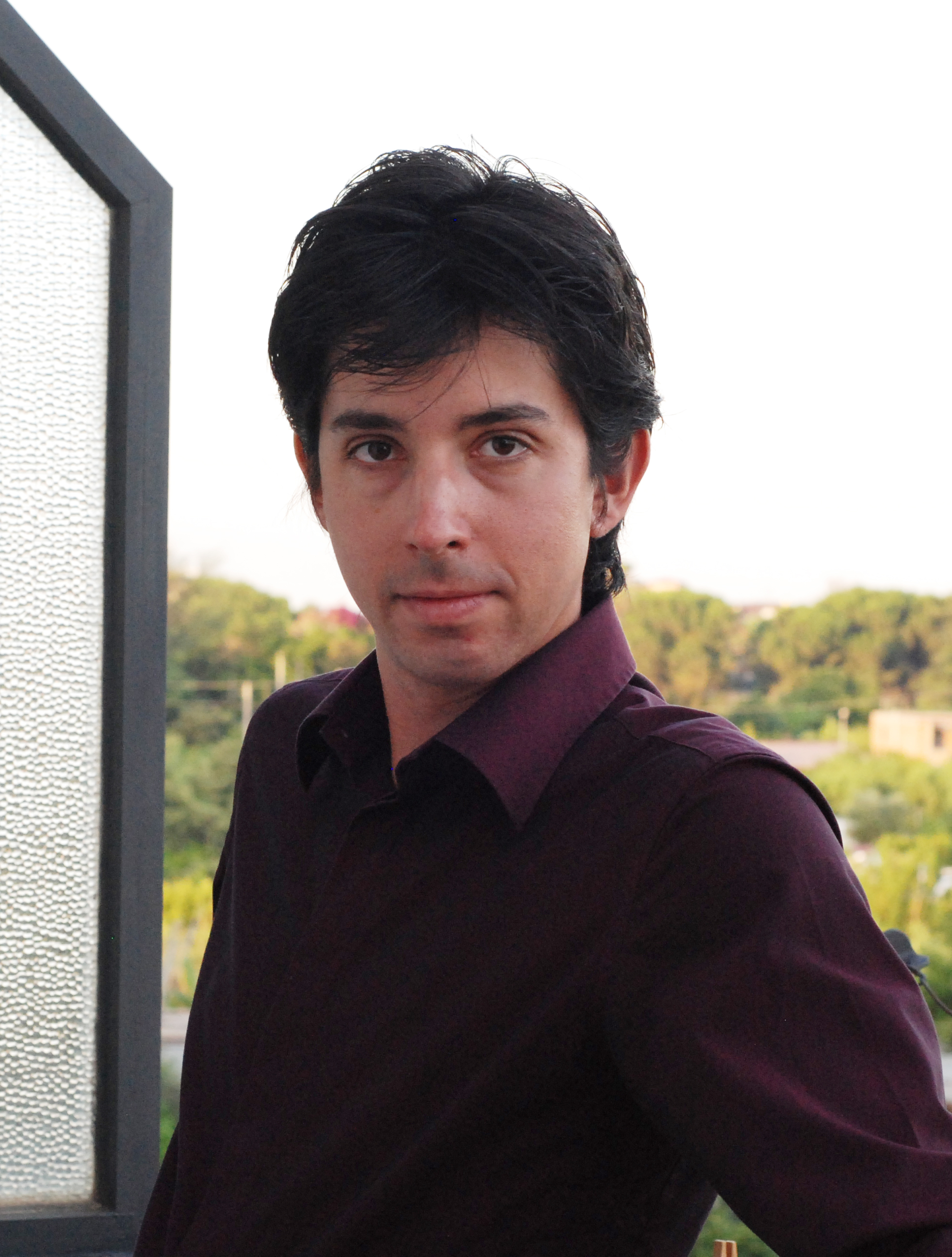 Daniel Stagno